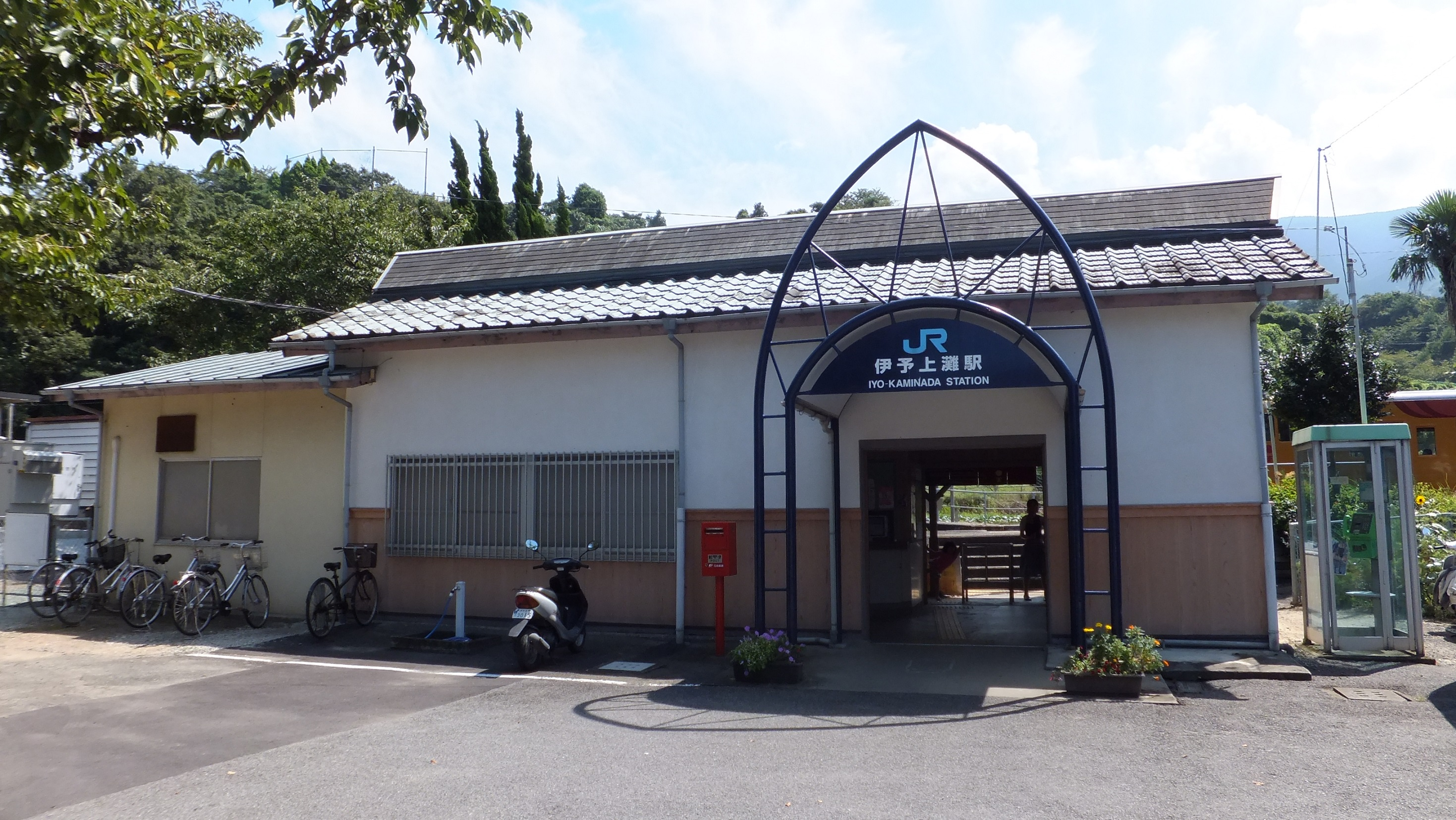 JR予讃線（愛ある伊予灘線）伊予上灘駅 （愛媛県伊予市 2015年）